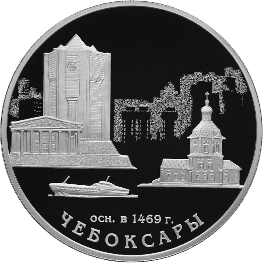 Монета Банка России, 550-летие основания г. Чебоксары. 3 рубля, 2019 г., серебро, реверс, пруф. Рельефные изображения достопримечательностей города Чебоксары: драматический театр, здание администрации и Успенский храм на фоне стилизованного изображения города; внизу – надписи: «ЧЕБОКСАРЫ», «осн. в 1469 г.». Чеканка — Санкт-Петербургский монетный двор. Художник: Е.В. Крамская. Скульптор: А.Н. Бессонов.